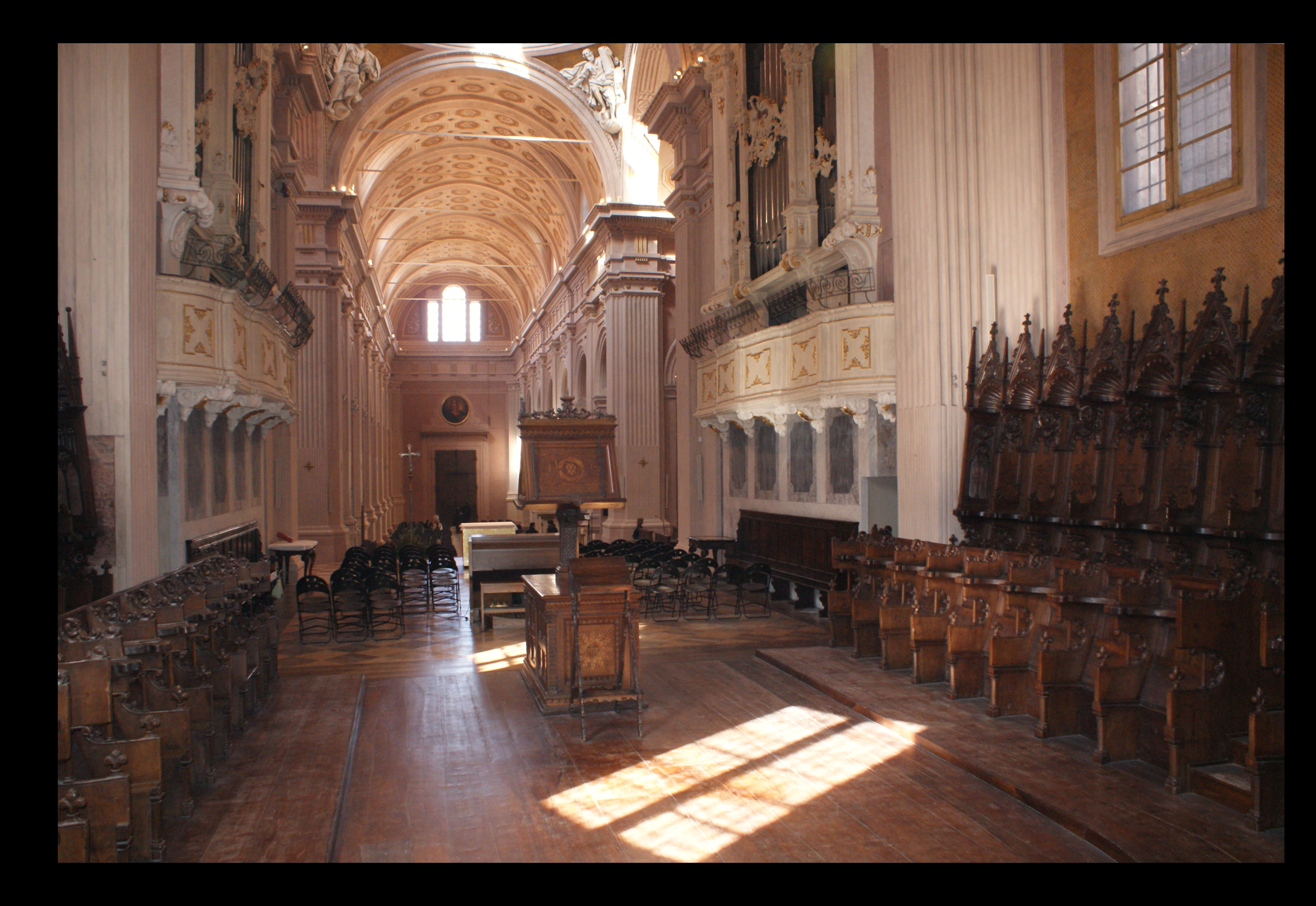 Stalli della cattedrale di Reggio Emilia, Italy